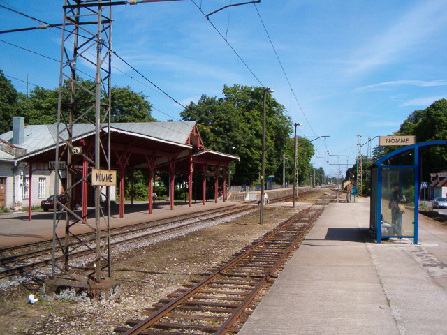 Nõmme raudteepeatus